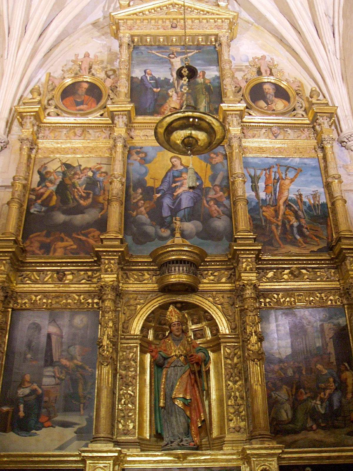 Mezquita-Catedral de Córdoba